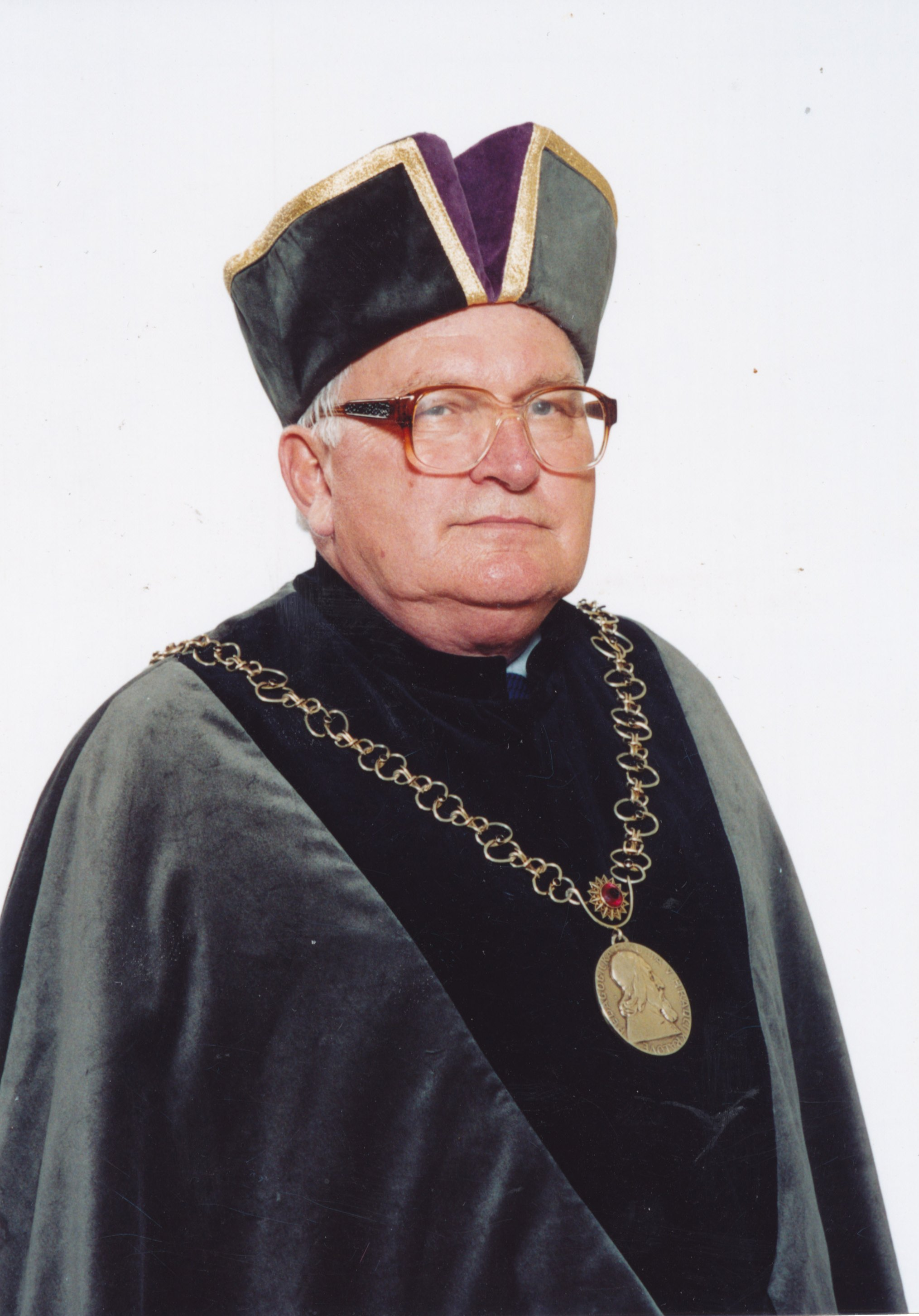 Vladimír Wolf jako děkan Pedagogické fakulty Univerzity Hradec Králové (1999-2005)